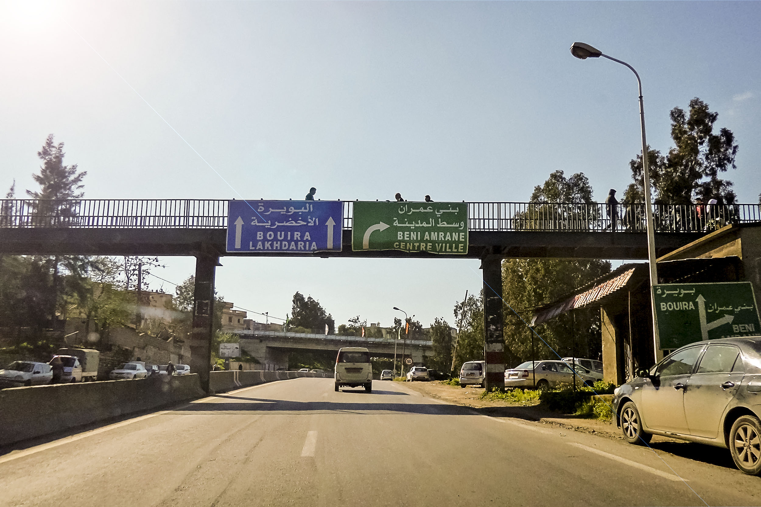 Beni Amrane بني عمران